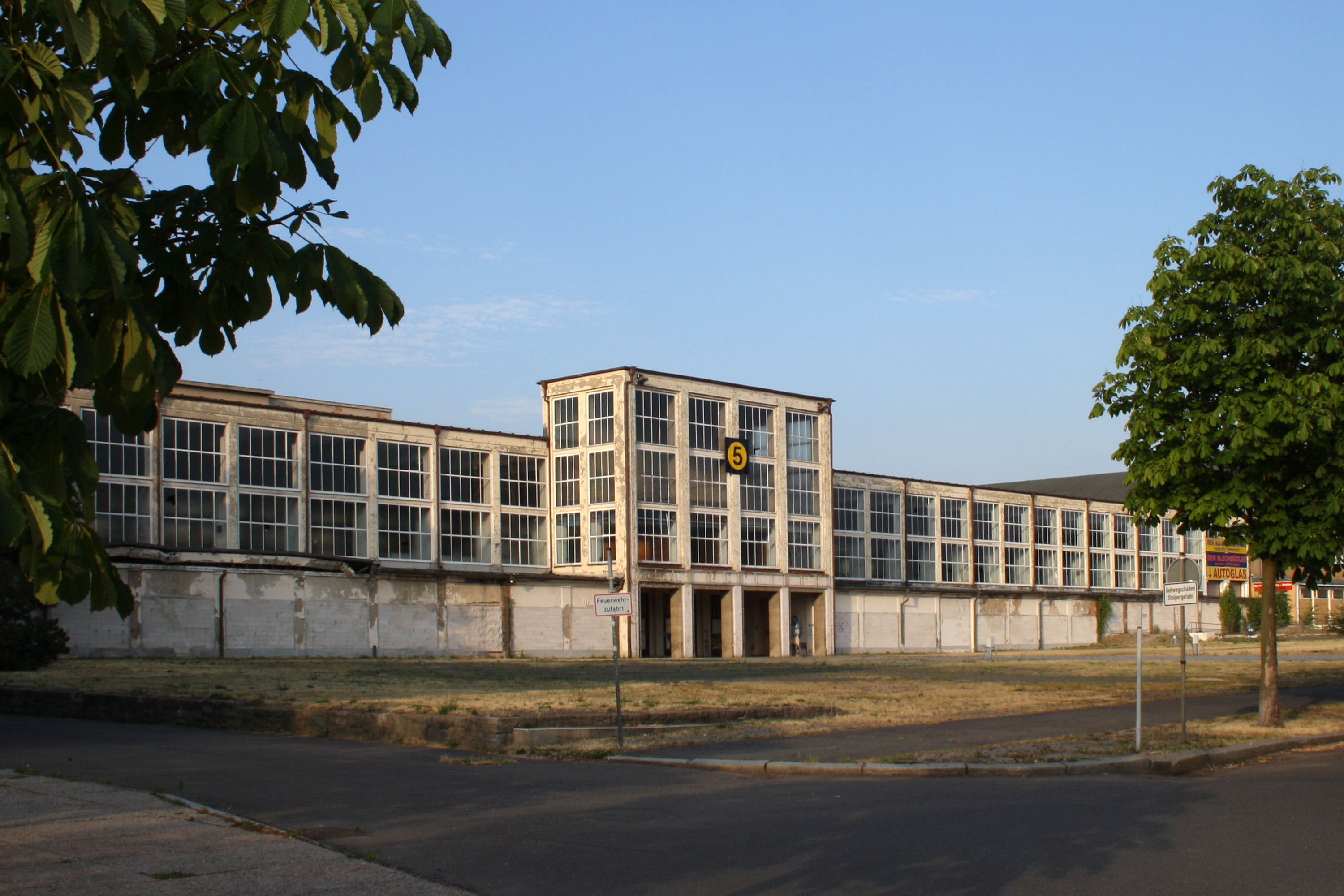 unsanierte Messehalle 5 auf dem alten Leipziger Messegelände